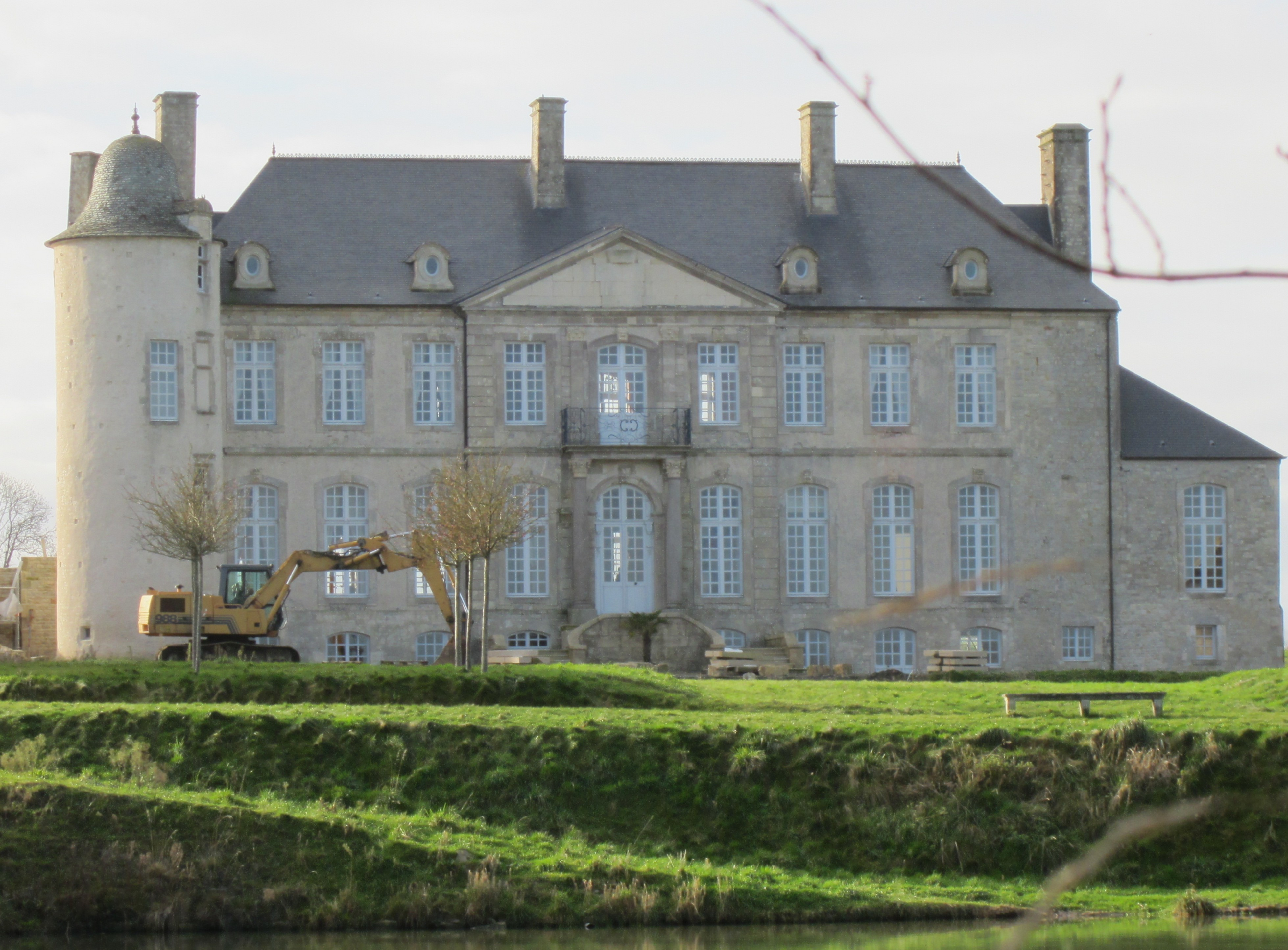 Château de Sébeville (18e) .